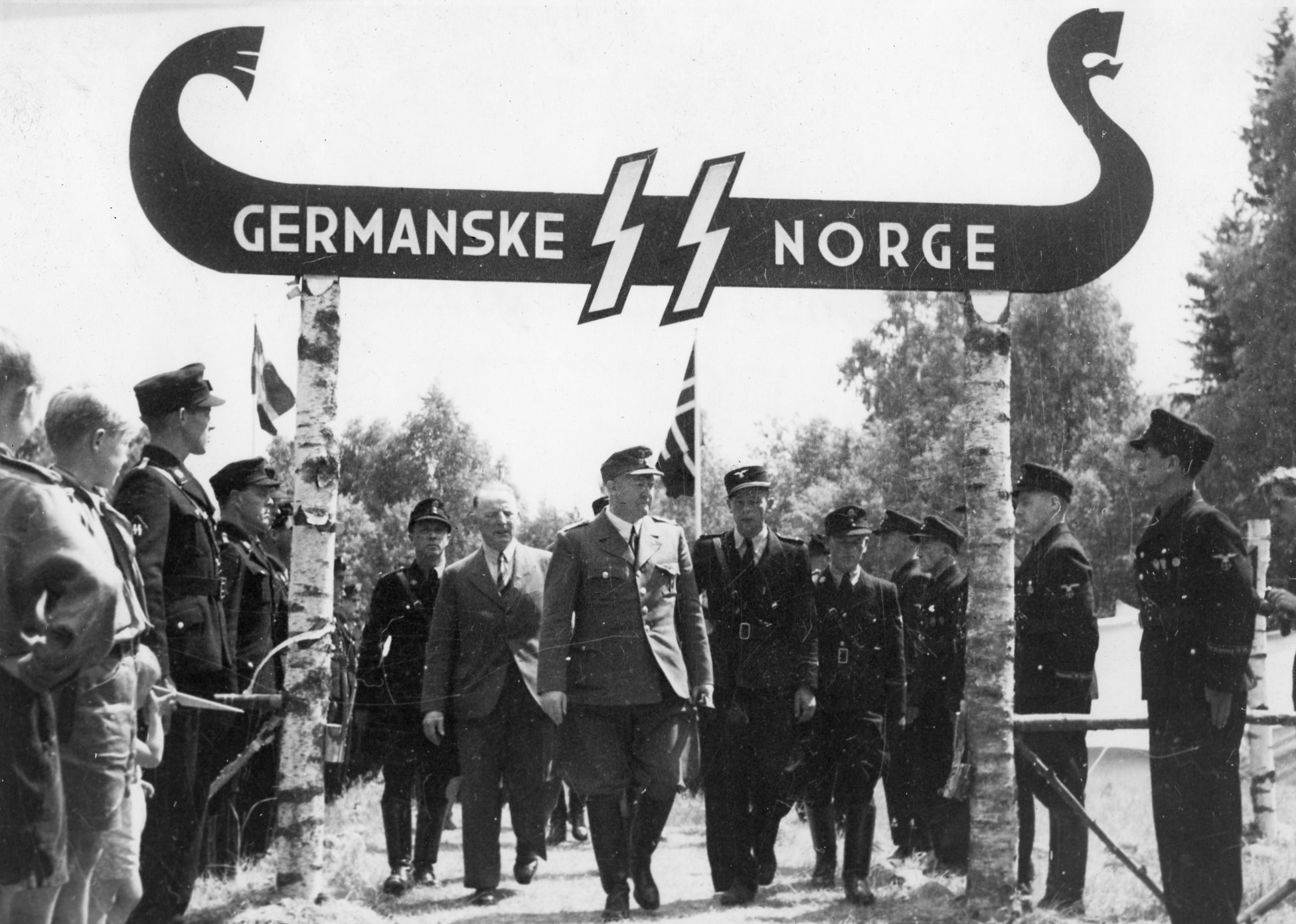 Veranstaltung der Germanischen SS in Norwegen (1941). RA/RAFA-3309/U 38A/3/38-3-2 img123